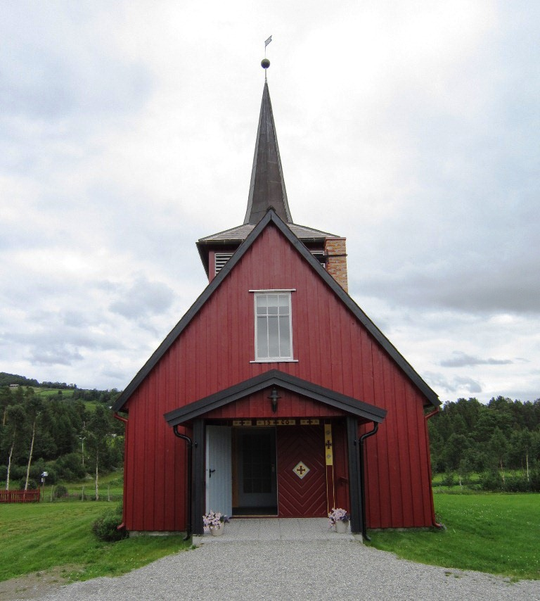 Dalsbygda kirke (Os i Østerdalen)